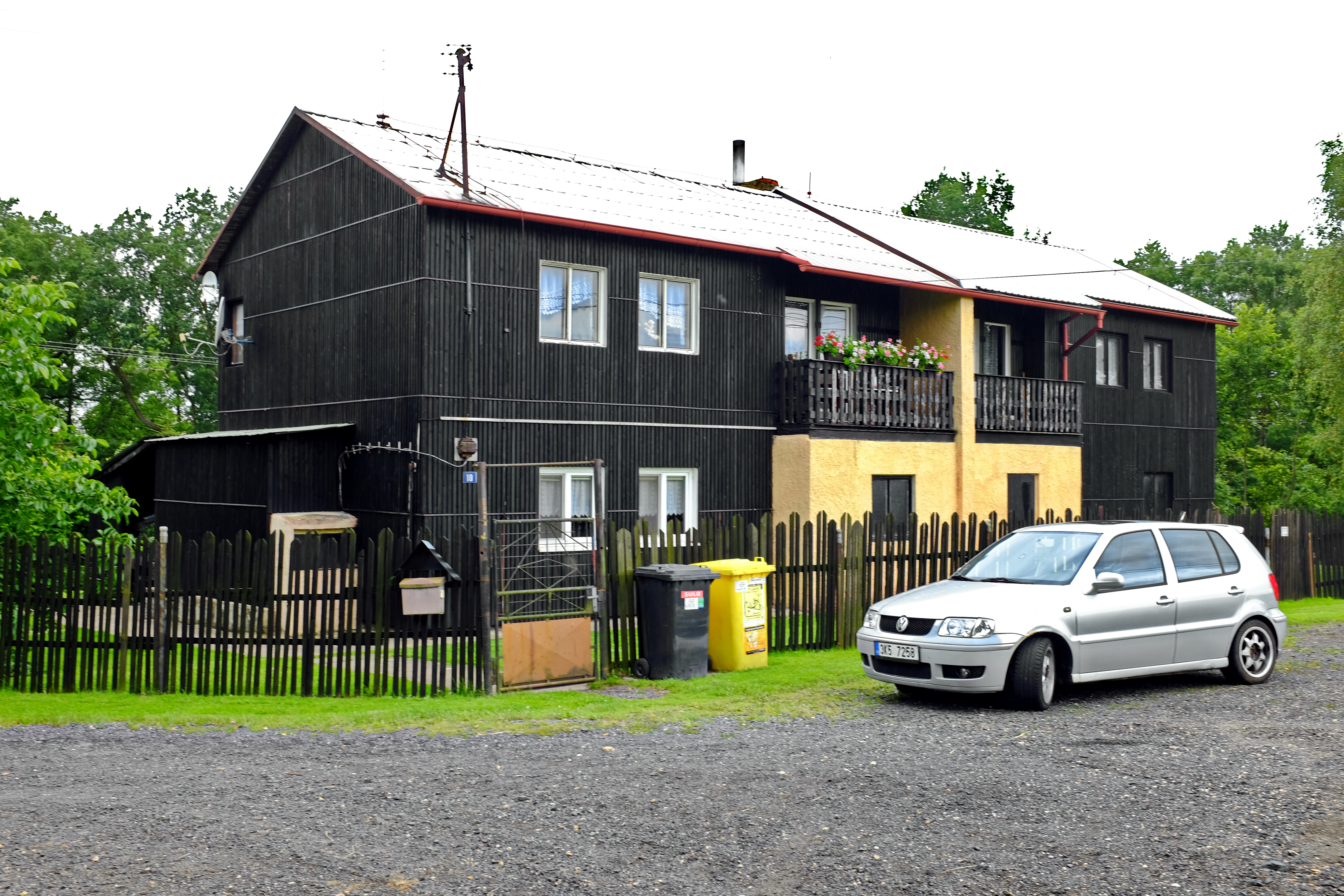 Vackovec, osada obce Milhostov, okres Cheb